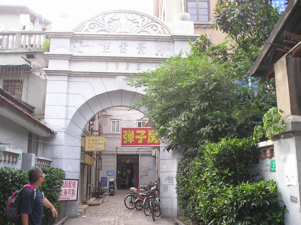 Fra Hongkou.